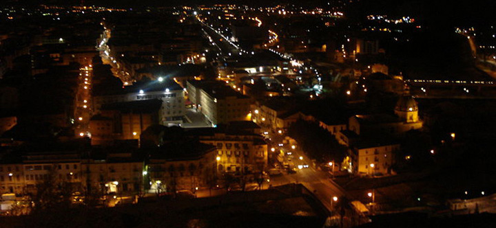 COSENZA CENTRO VISTA DA PORTAPIANA